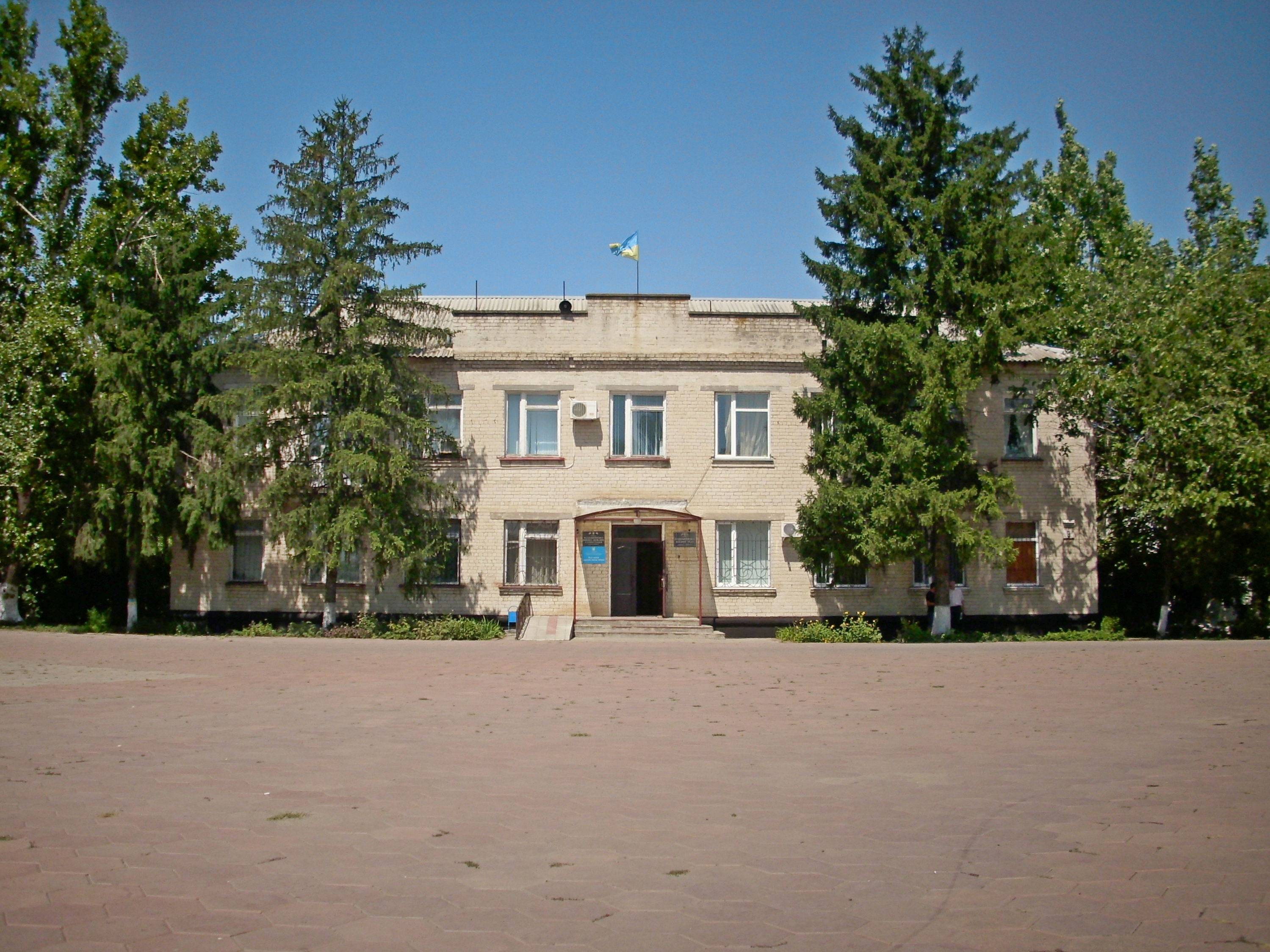 Будинок Роздільяннської районної державної адміністрації